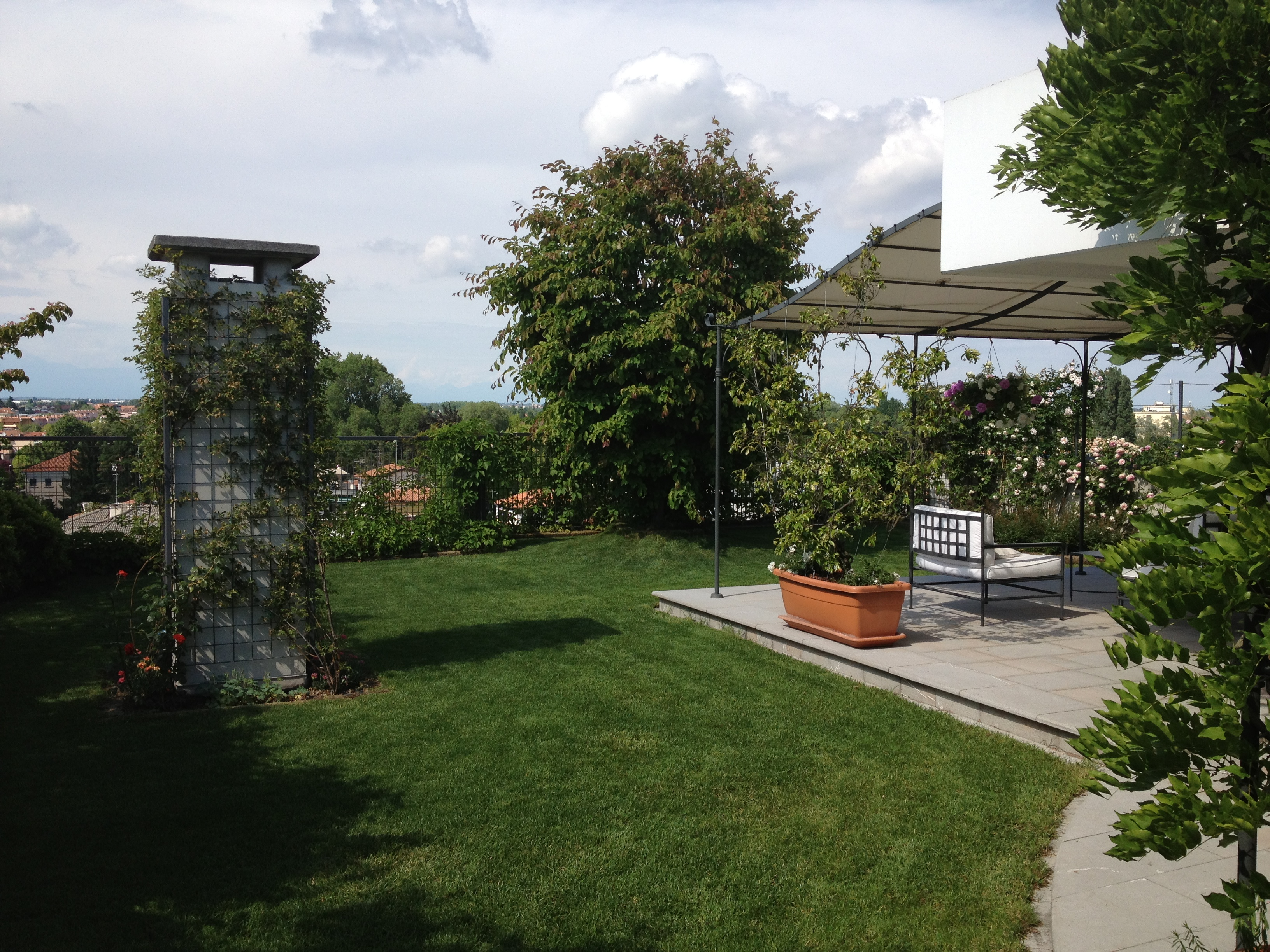 Abitazione privata San Donà di Piave (VE)